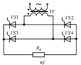 Файл запозичений з конспекту лекцій з курсу "Енергетична елетроніка" факультету електроніки НТУУ"КПІ".